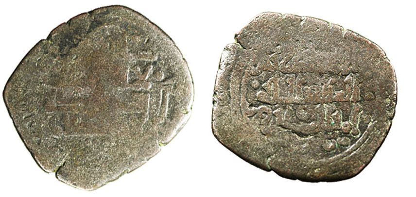 Dirham del rey taifa de Granada Badis ben Habús. Mientras que los dirhams se acuñaban normalmente de plata, este es de vellón.